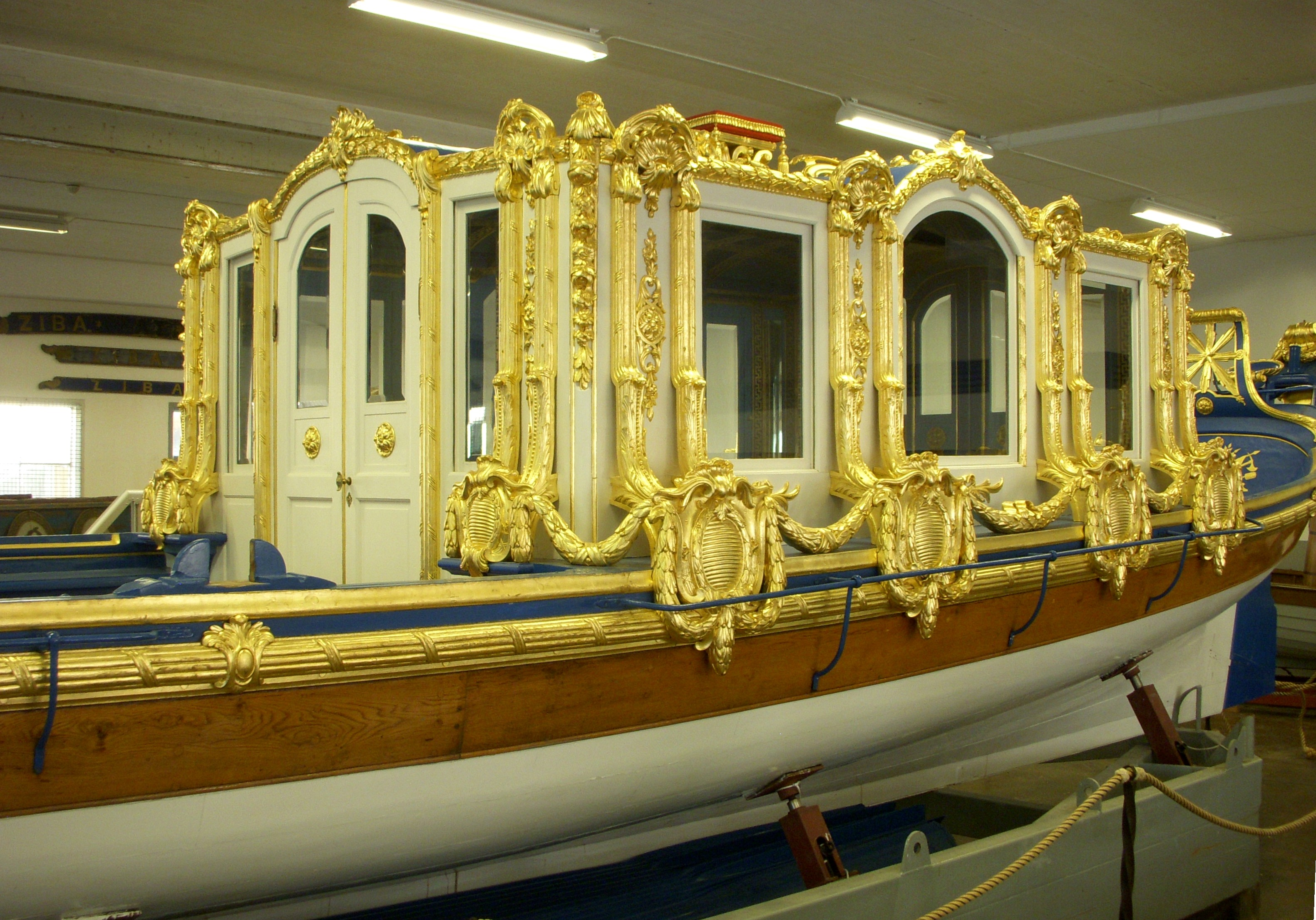 Vasaorden (kungaslup), påbyggnad